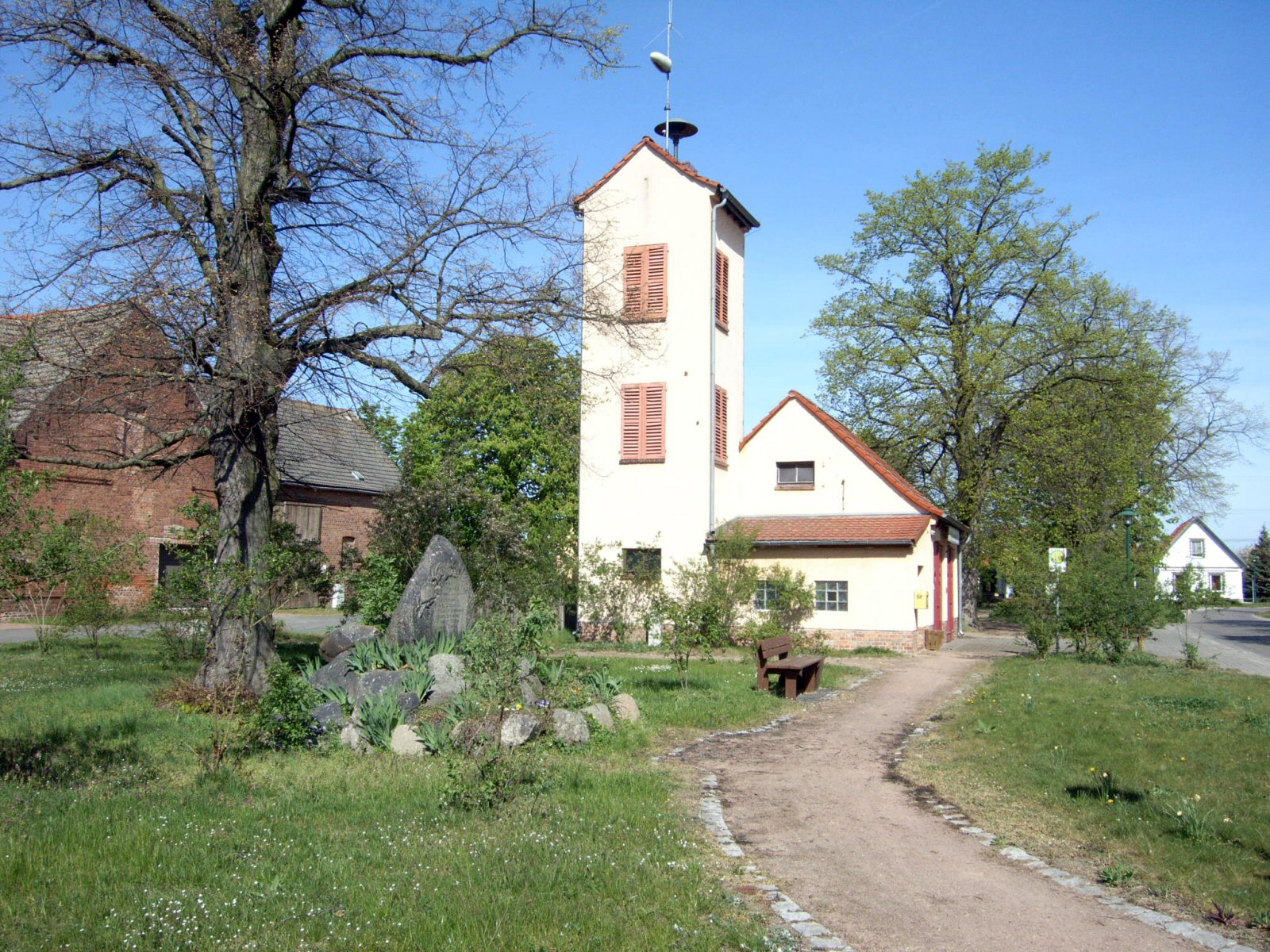 Marke (Anhalt),Kriegerstein und Freiwillige Feuerwehr